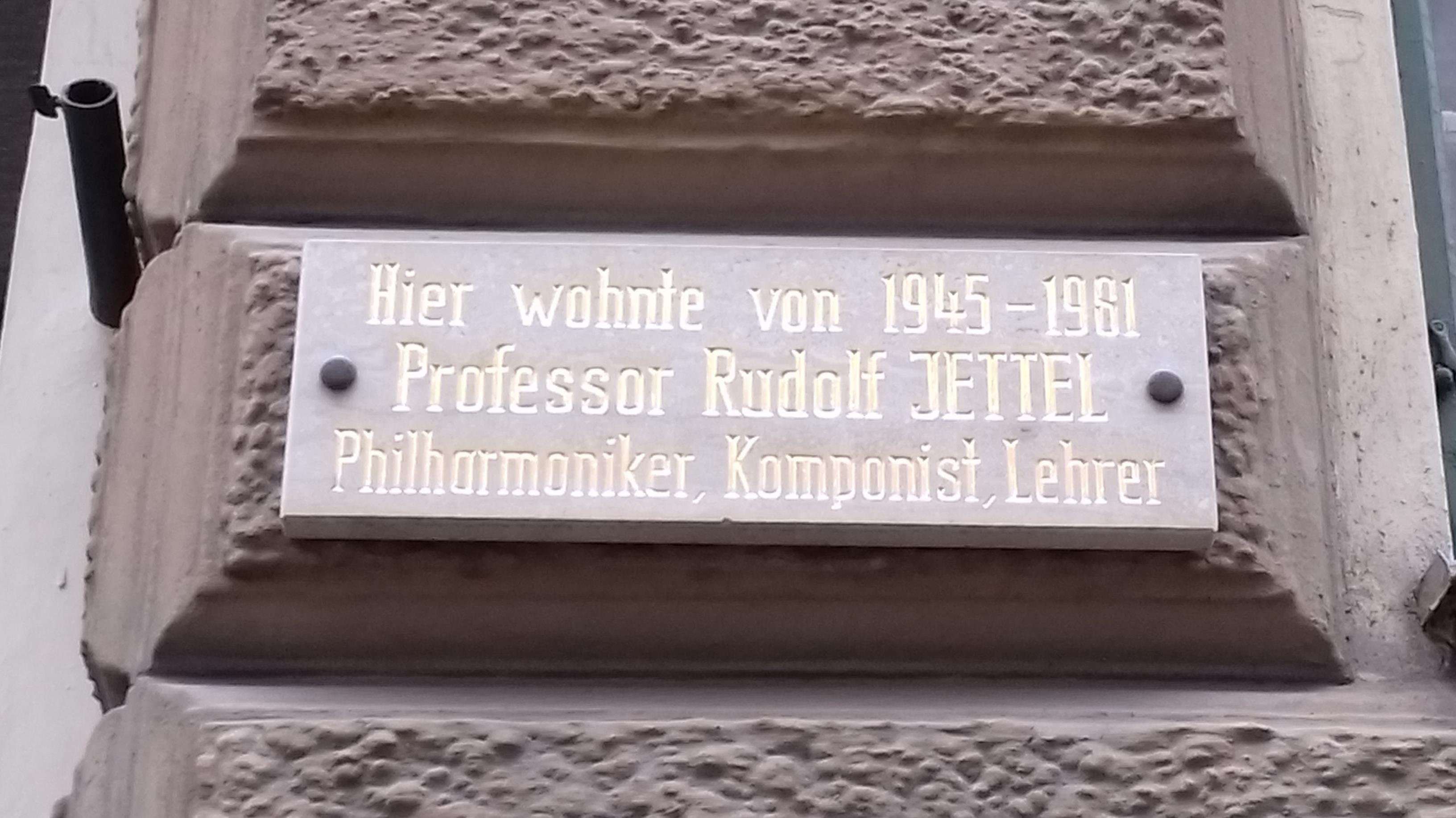 Gedenktafel für Rudolf Jettel, Apfelgasse 3